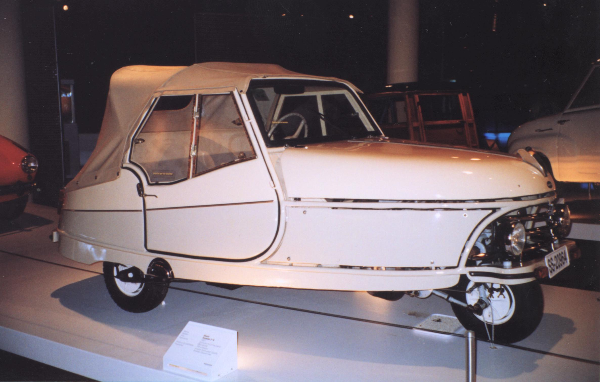 David Torpedo 2 S David Torpedo 2 S. Shot in Cosmocaixa, Alcobendas, 2004.